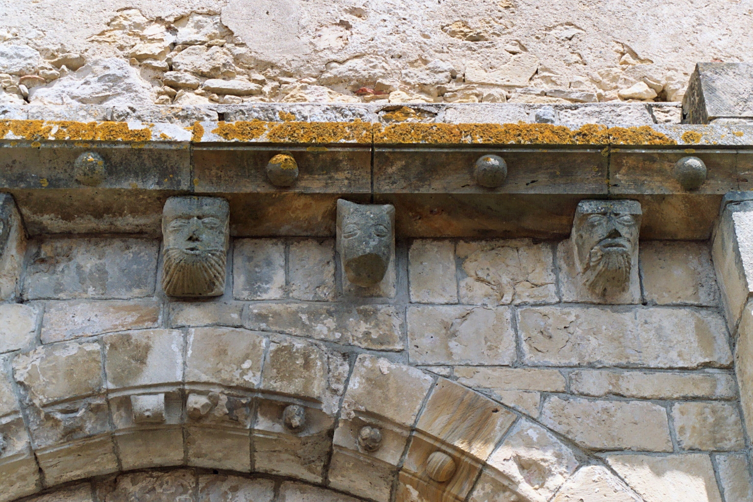 France - Languedoc - Aude - Église de Payra-sur-l'Hers